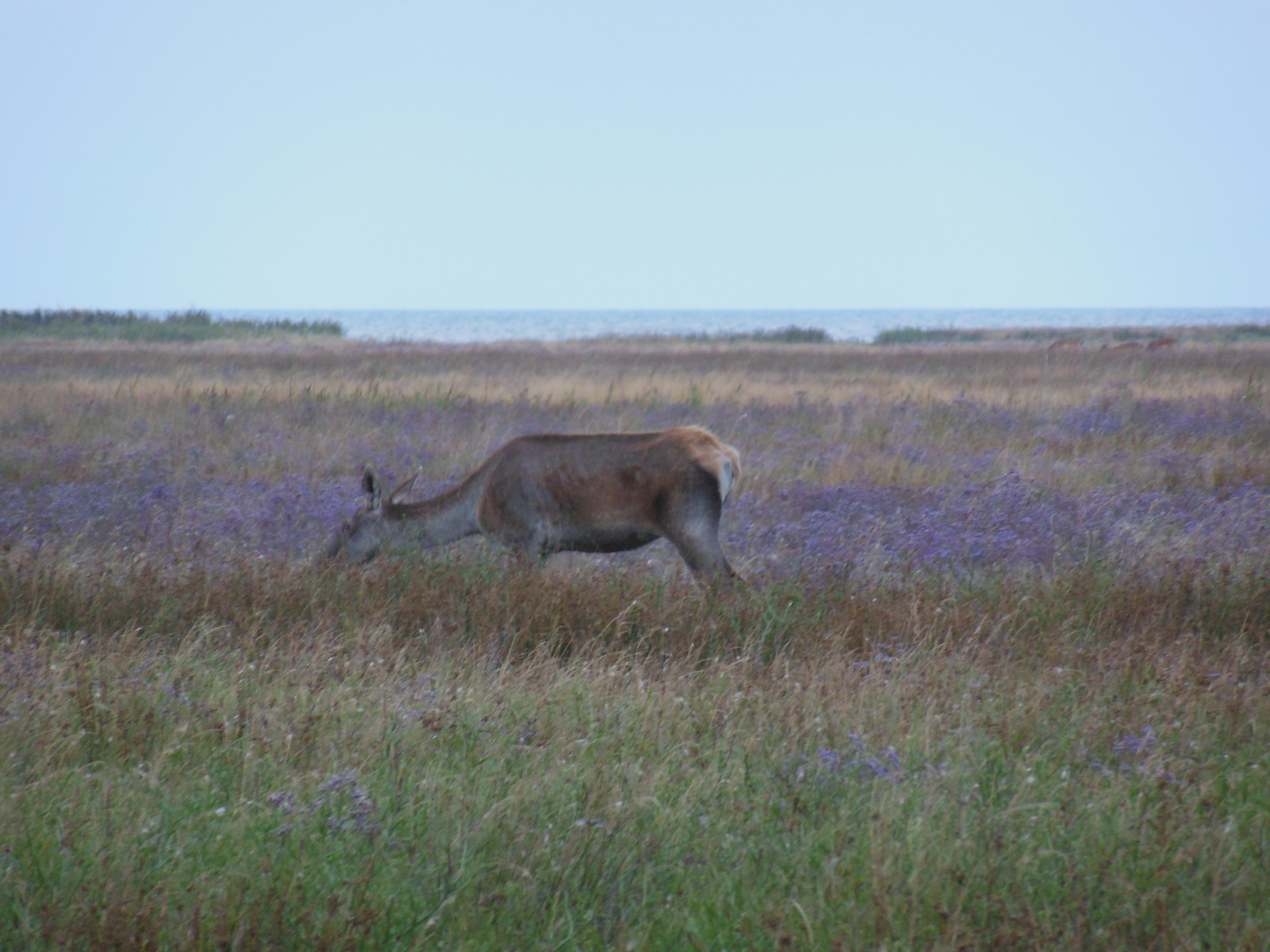 Самиця оленя, що пасеться поблизу бази відпочинку на о. Джарилгач. 13.09.2015.